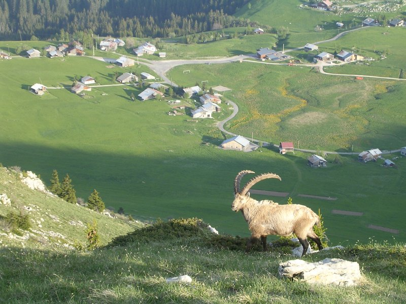 Le plateau de Solaison, avec un bouquetin au premier plan